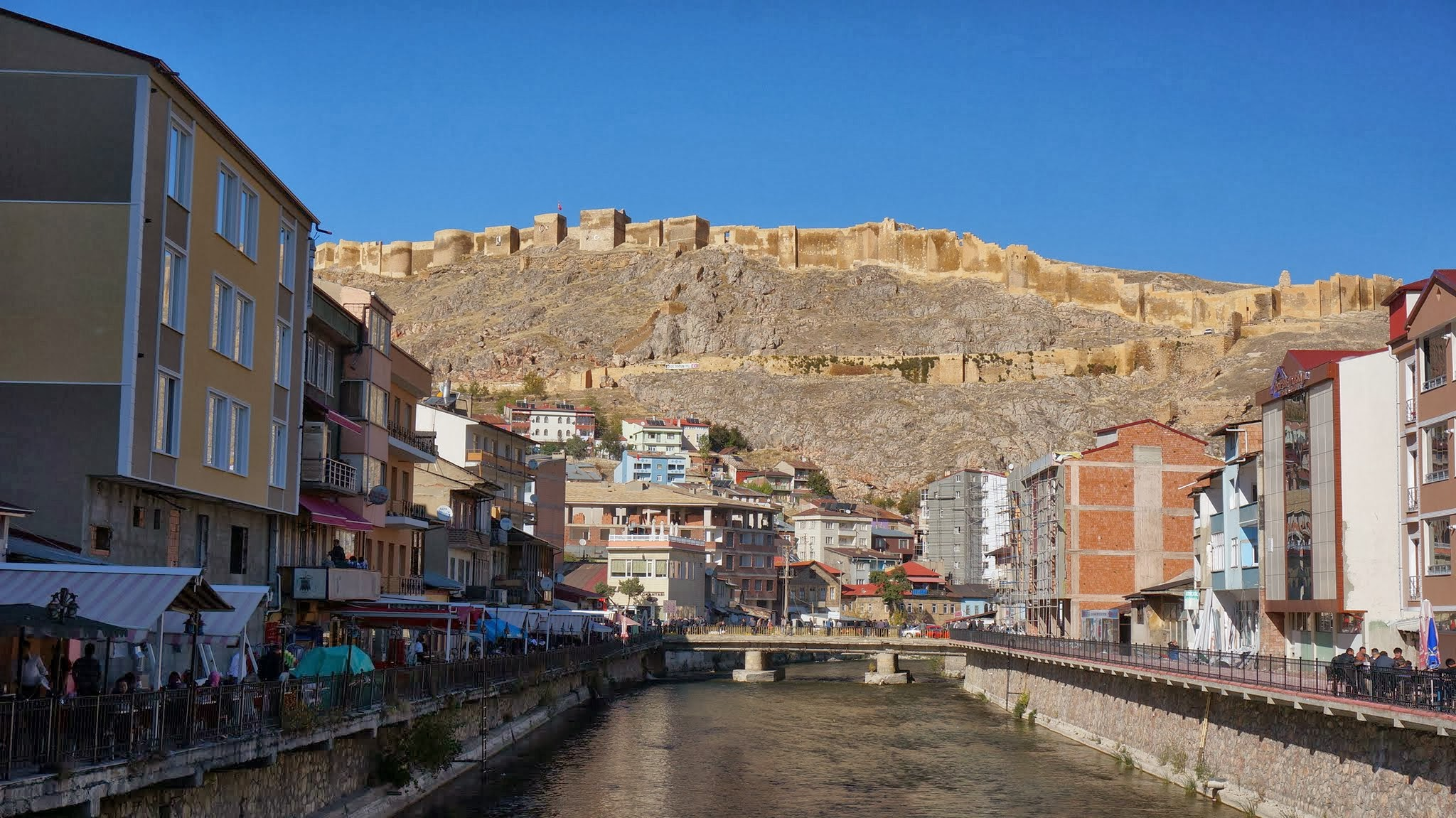 Bayburt, 69000 Bayburt Merkez/Bayburt, Turkey